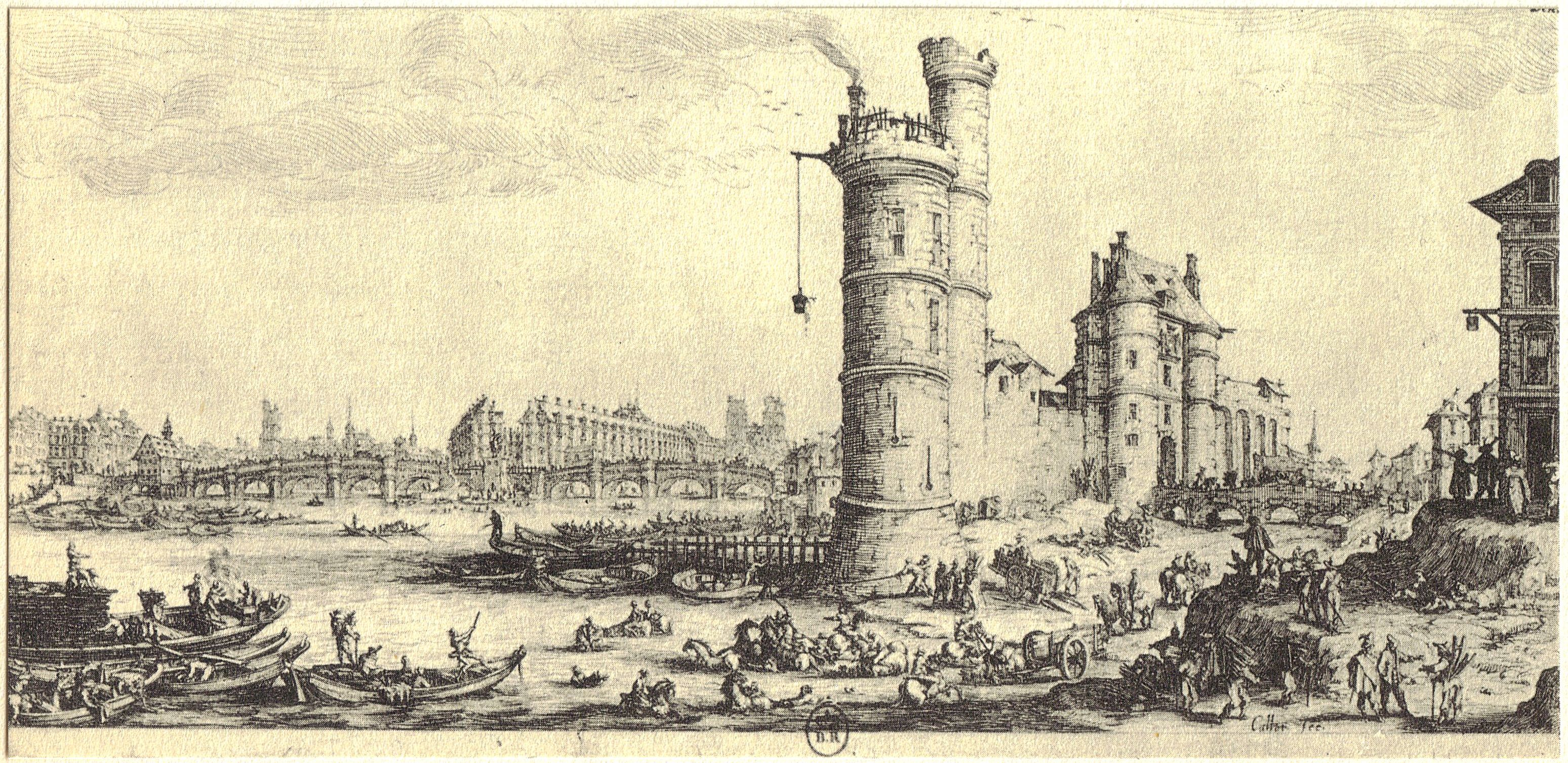 Le pont-Neuf et la tour de Nesle - gravure de Jacques CALLOT (1592-1635) Hauteur : 0,16 m largeur : 0,33 m conservée à la bibliothèque Nationale, Cabinet des Estampes Paris